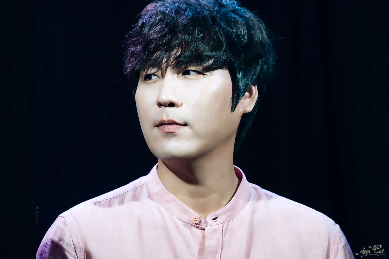 뮤톡콘서트 정상윤 배우님